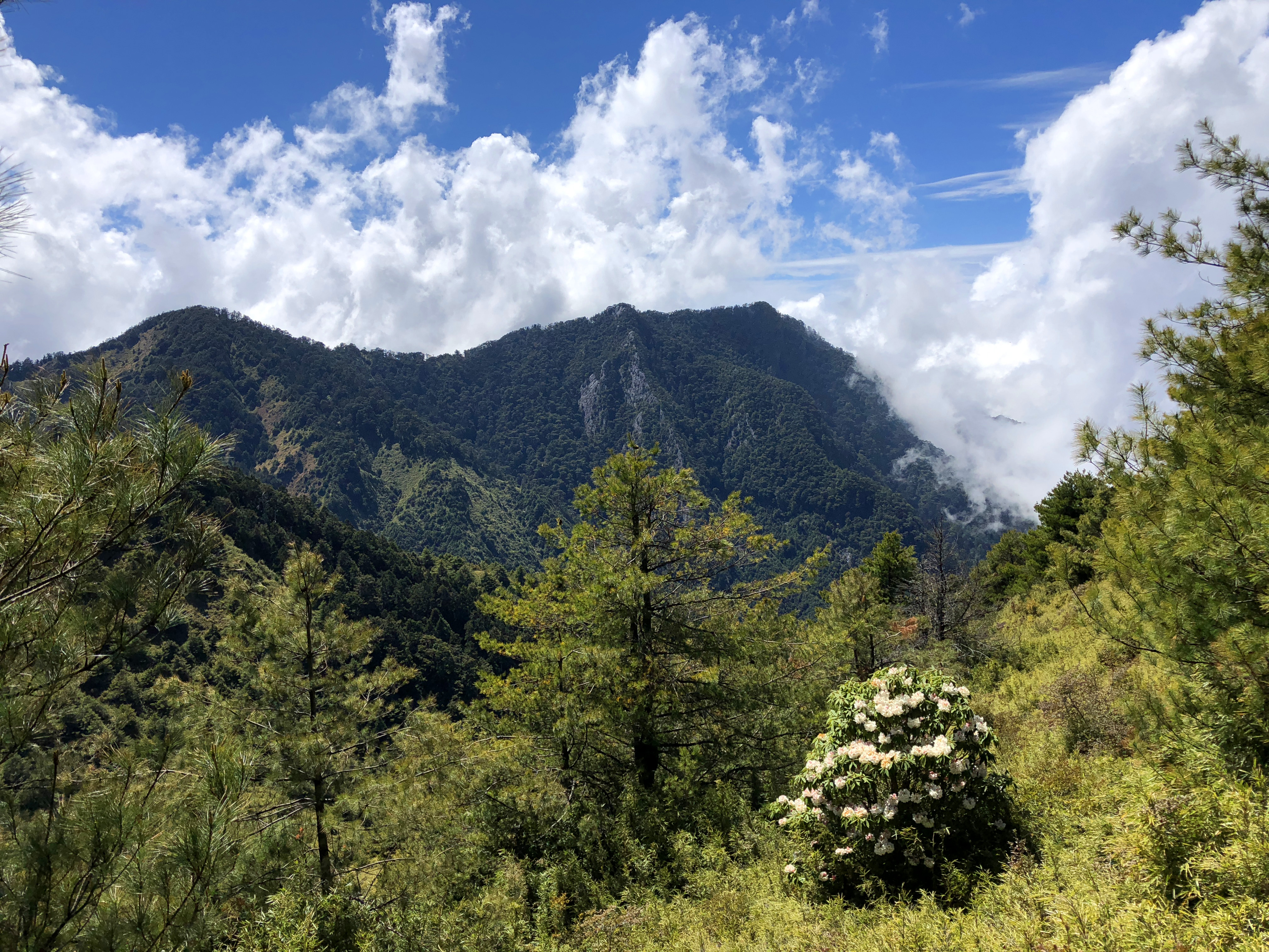 中文（台灣）: Mt.ZhongXue 中雪山